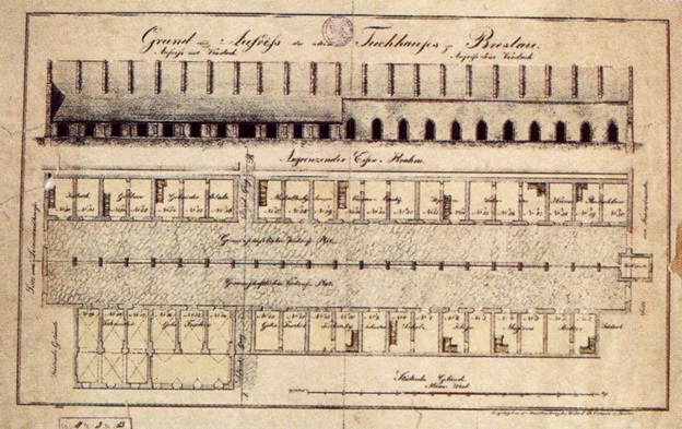 споруда